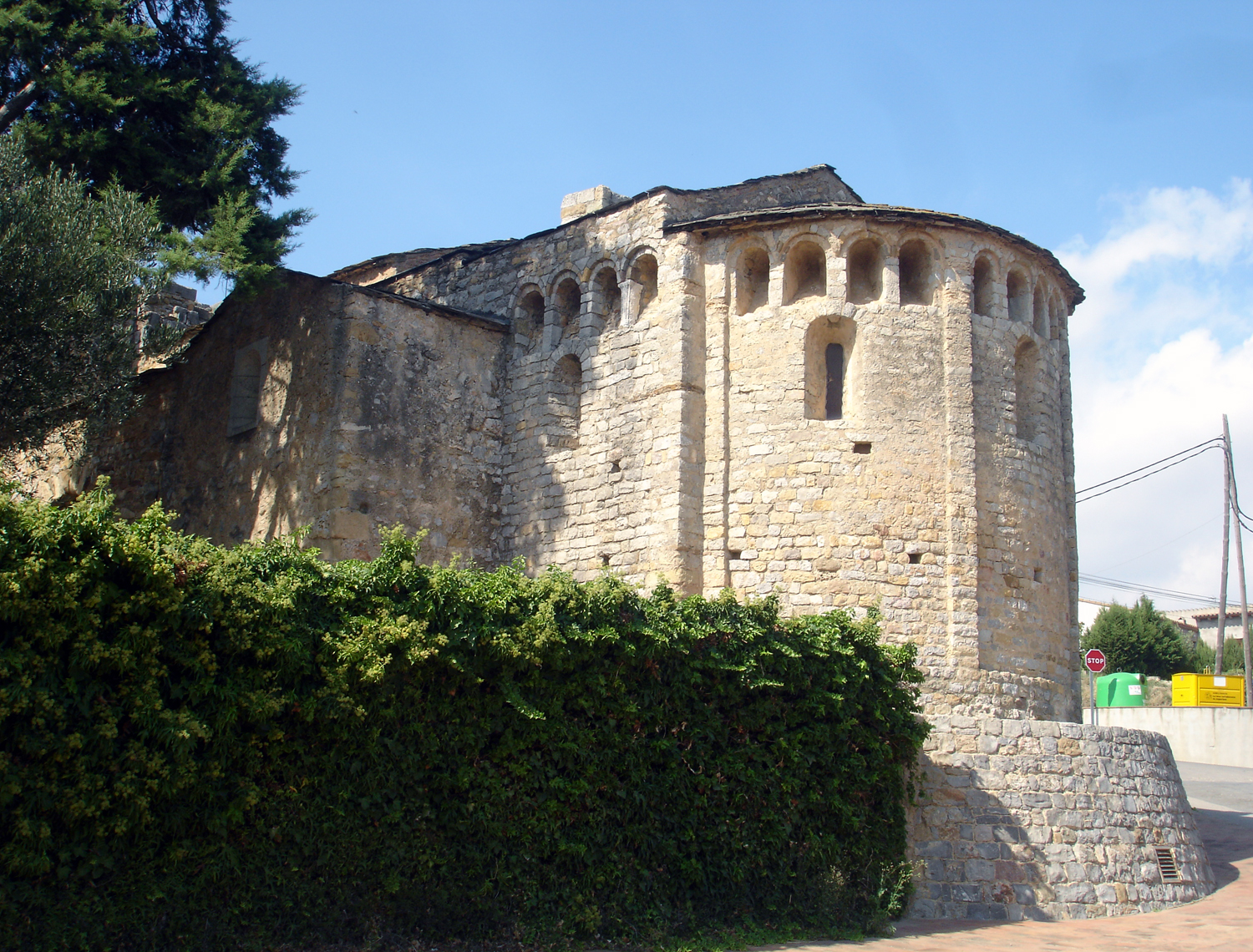 Esglèsia de Sant Joan de Bellcaire (Girona, Catalunya, Espanya)